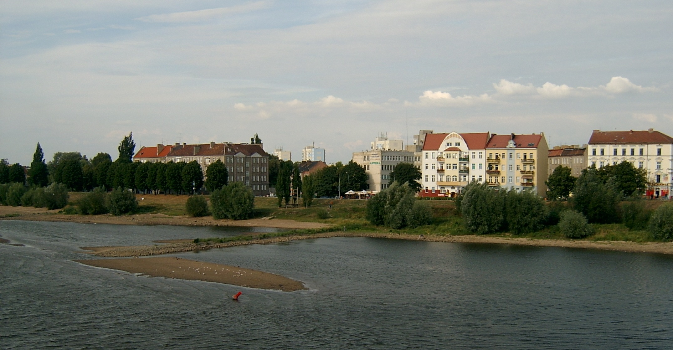 Słubice